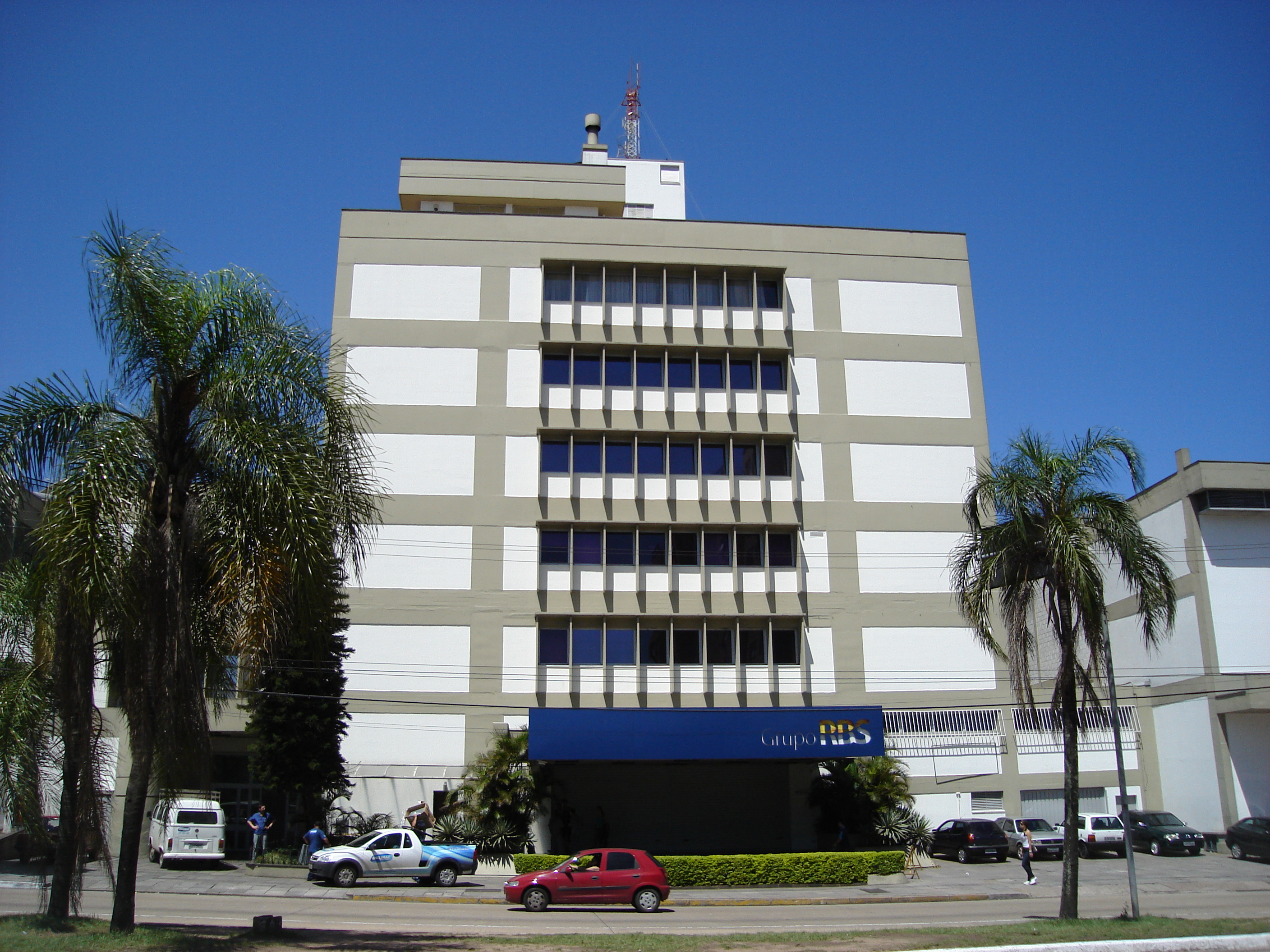 Sede do Grupo RBS em Porto Alegre, RS.